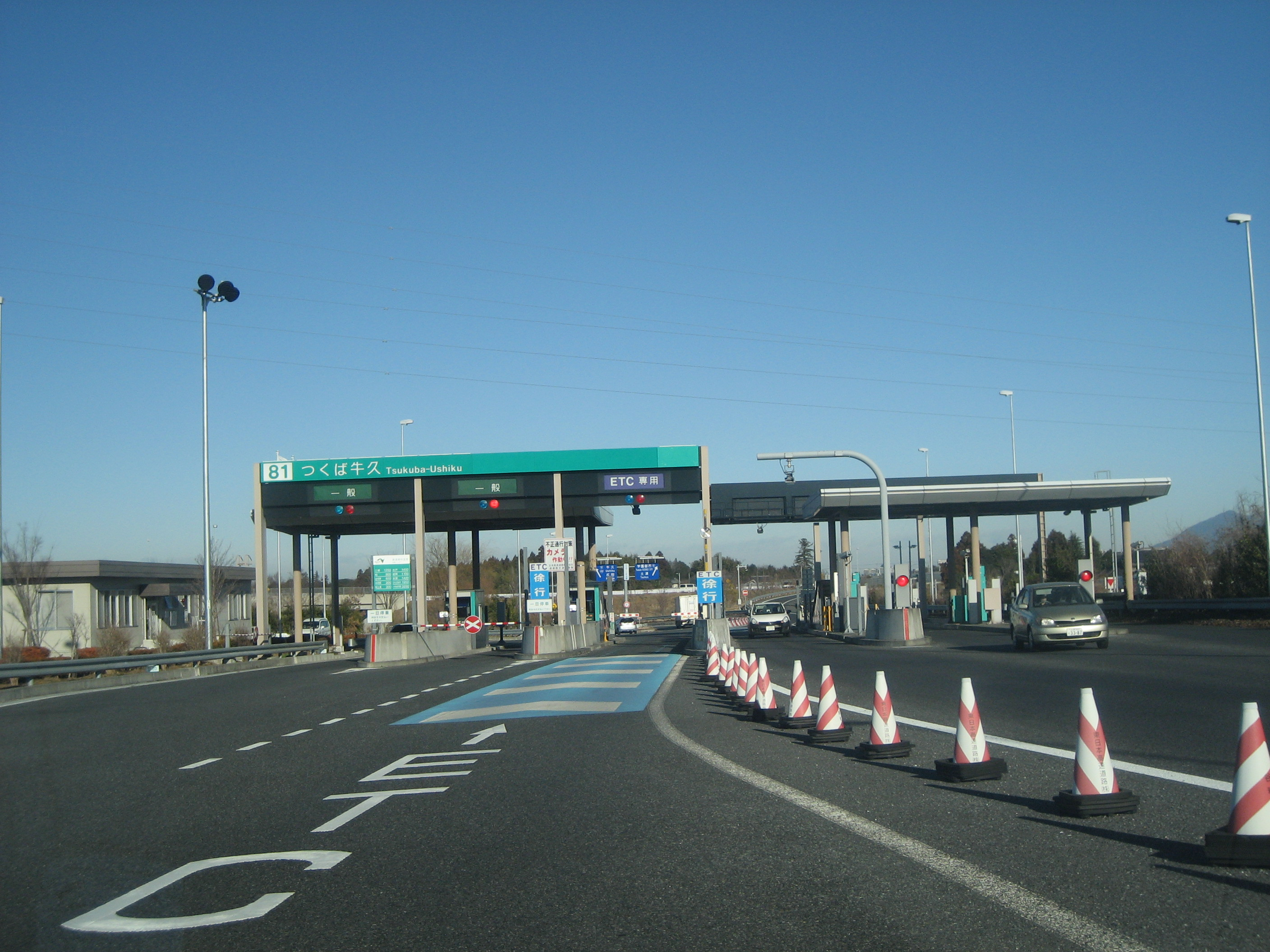 首都圏中央連絡自動車道つくば牛久IC料金所